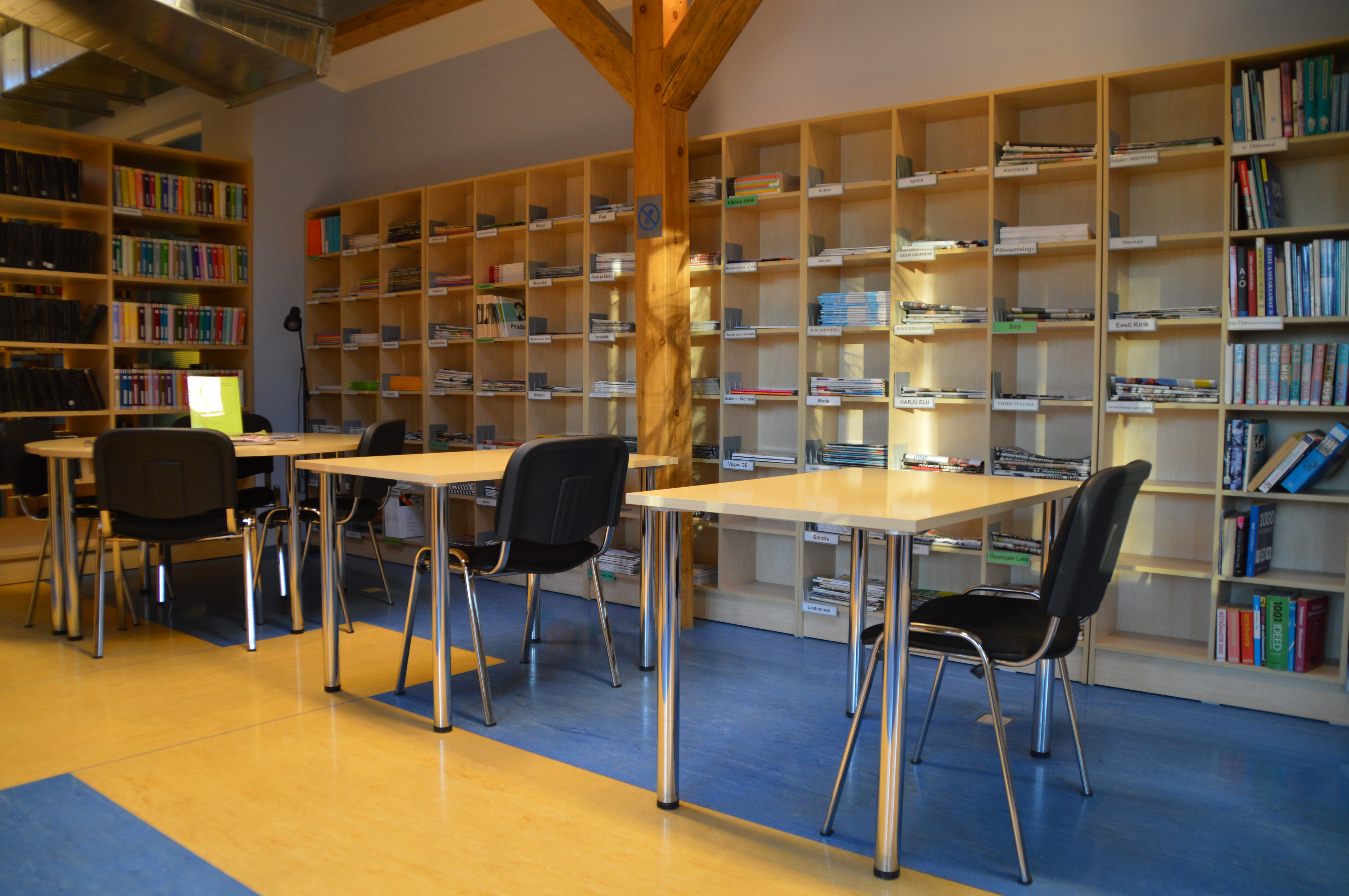 Viimsi Raamatukogu sisevaade